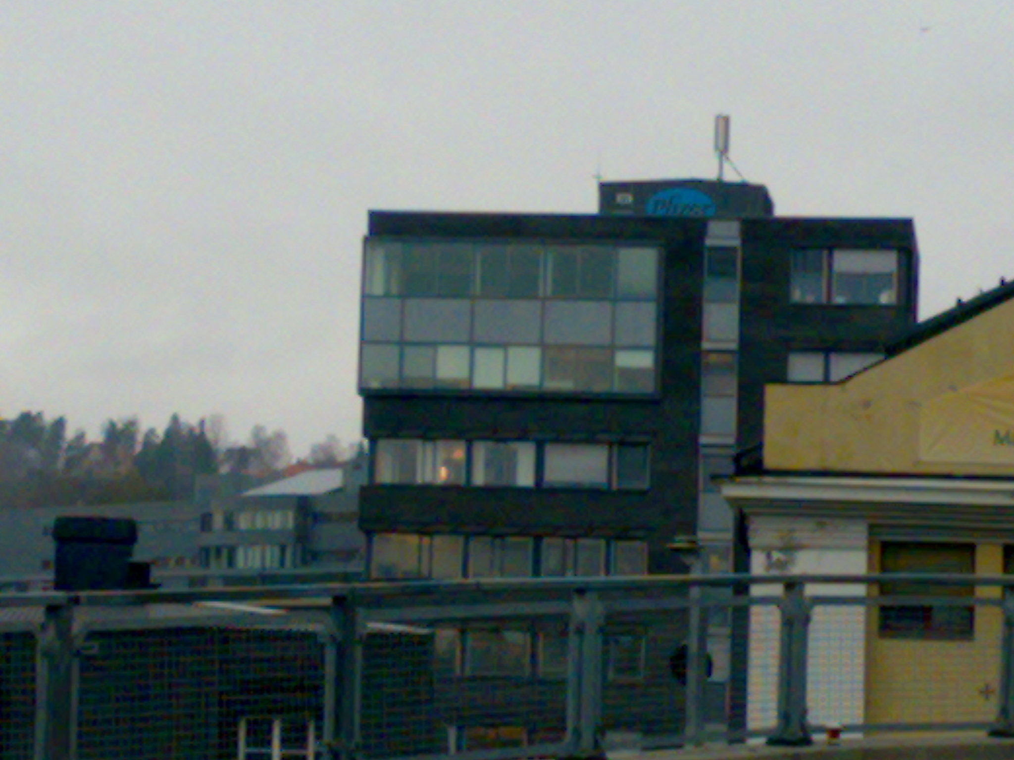 Pfizer HQ, Oslo, Norway